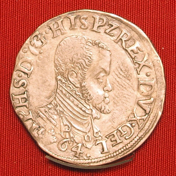 Philips II, eenvijfde philipsdaalder uit de periode 1558-1571.